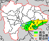 山梨県南都留郡の位置。